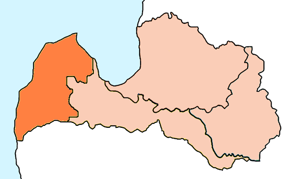 Mappa della diocesi cattolica di Liepaja, in Lettonia. Opera personale. Fonte per i confini delle diocesi